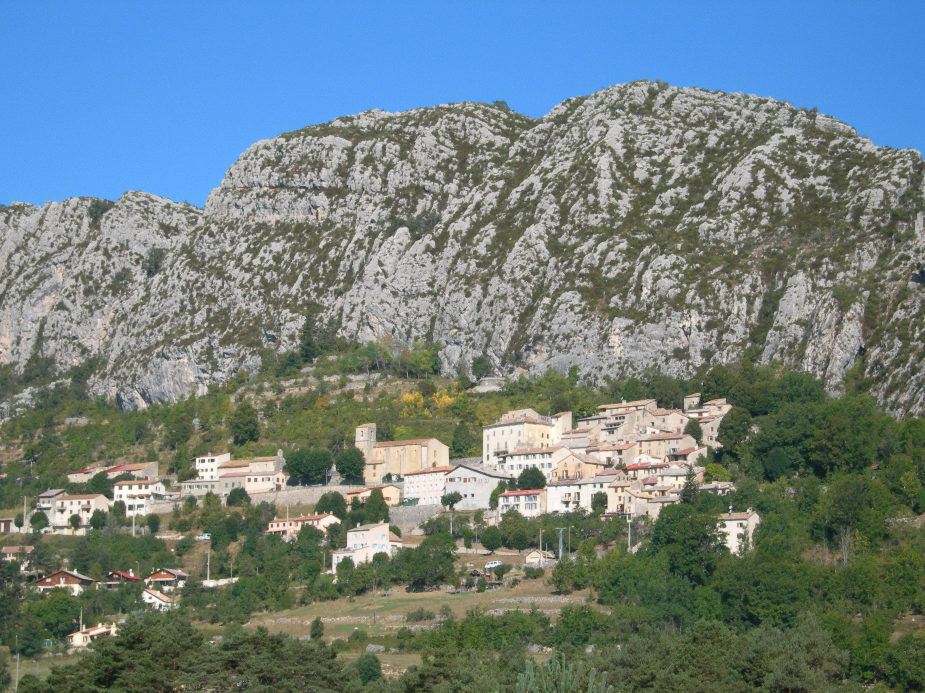 Saint-Auban; Alpes-Maritimes